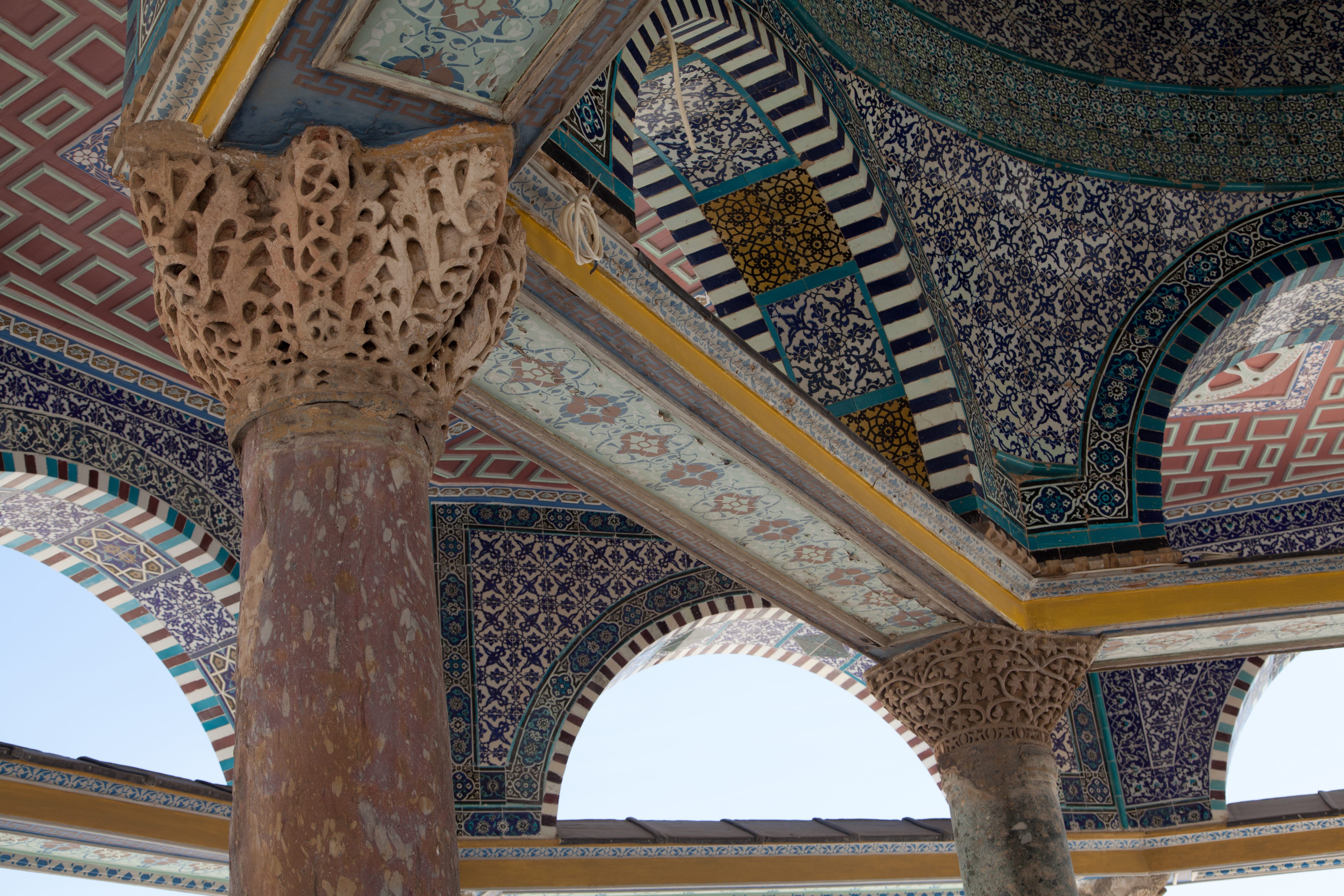 הר הבית הוא מתחם מוגבה ושטוח בן כ־140 דונם במזרח העיר העתיקה בירושלים, שהינו הרחבה מלאכותית מתקופת הורדוס (בן המאה הראשונה לפני הספירה), של הר המוריה הקדום.